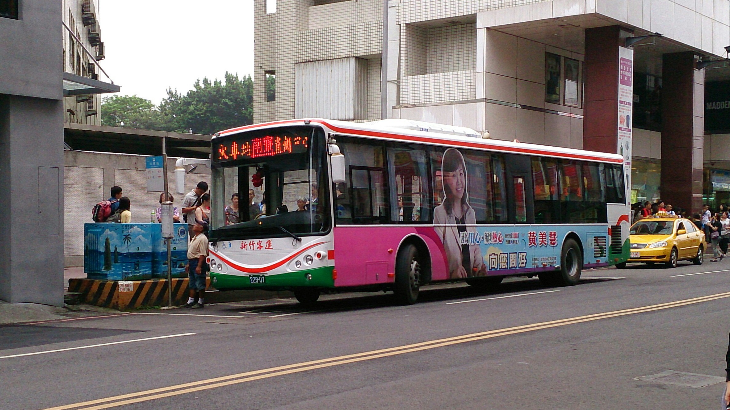 新竹客運申沃SWB6127低地板公車229-U7。